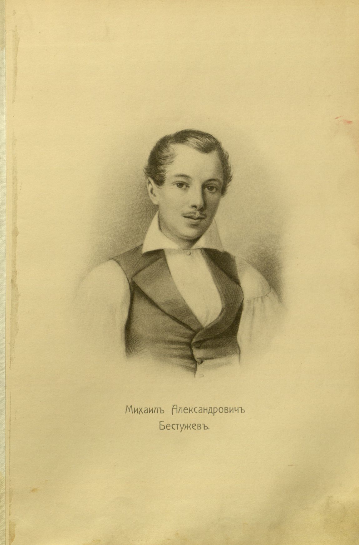 Головачев, П. М. Декабристы : 86 портретов, вид Петровского завода и 2 бытовых рисунка того времени. - М., [1906] Бестужев, Михаил Александрович